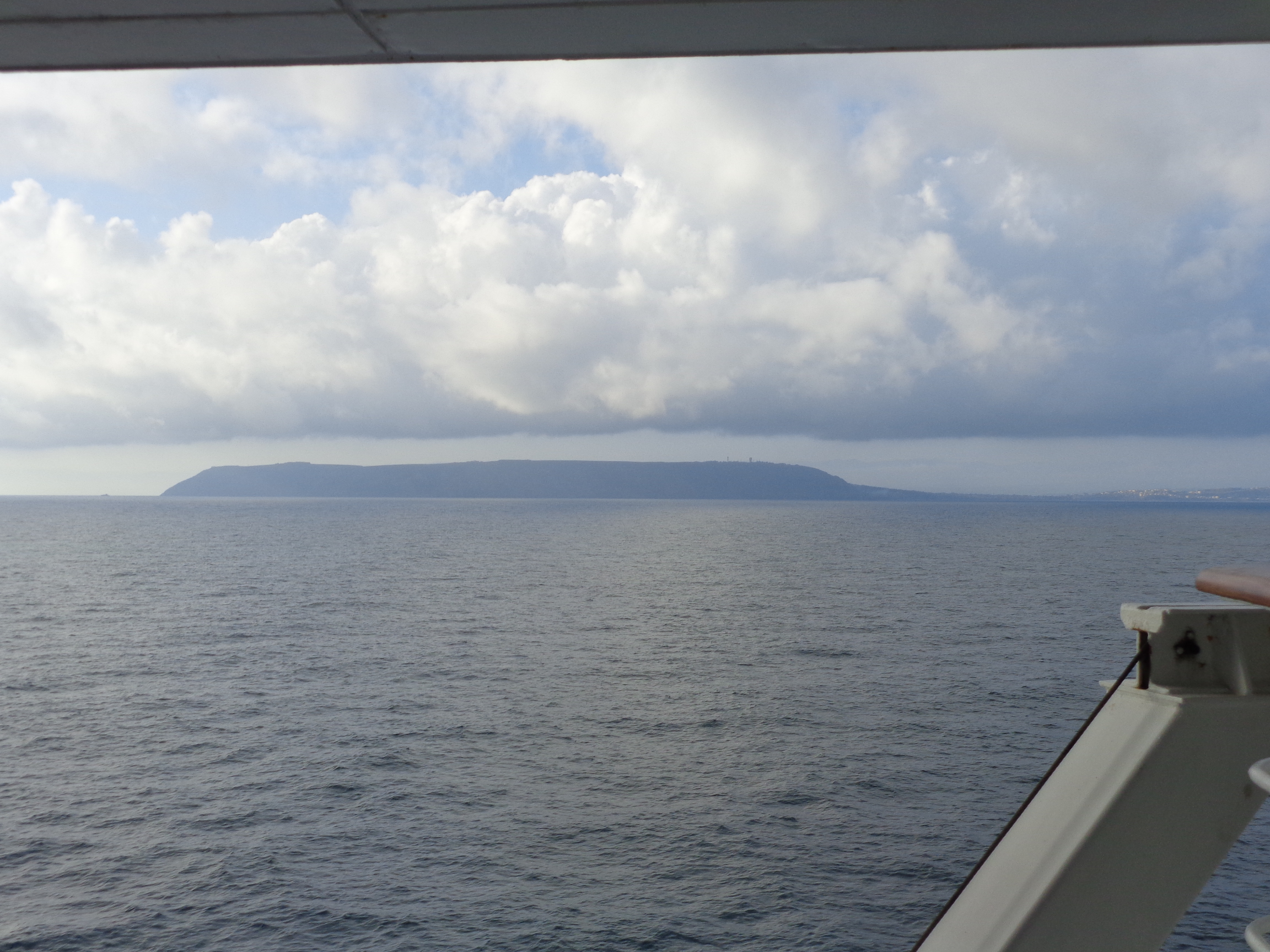 Nordspitze der Halbinsel İnceburun an der türkischen Schwarzmeerküste, fotografiert von MS Deutschland.